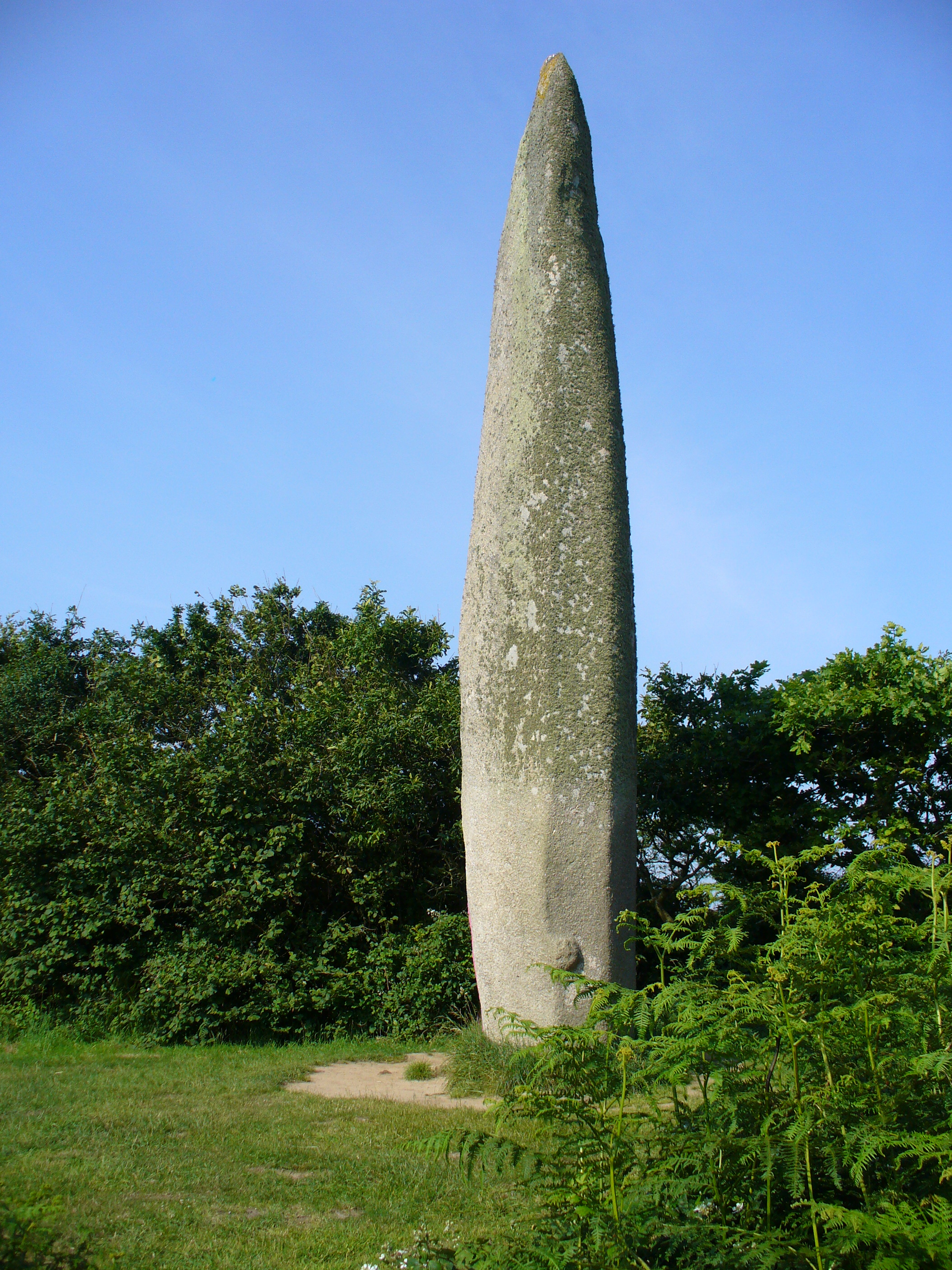 Menhir de Kerloas à Plouarzel (29)